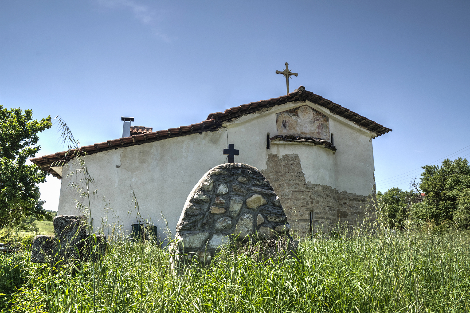 Црква Свети Спас - Добри Дол, има интересна внатрешност со стари фрески и икони